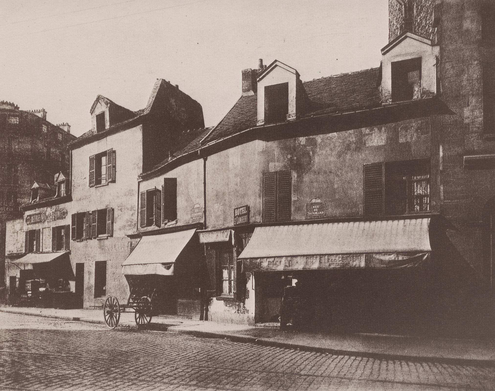 Atget, Eugène: Alte Häuser, alte Straßen, pittoreske Ansichten, Rue Desnouettes